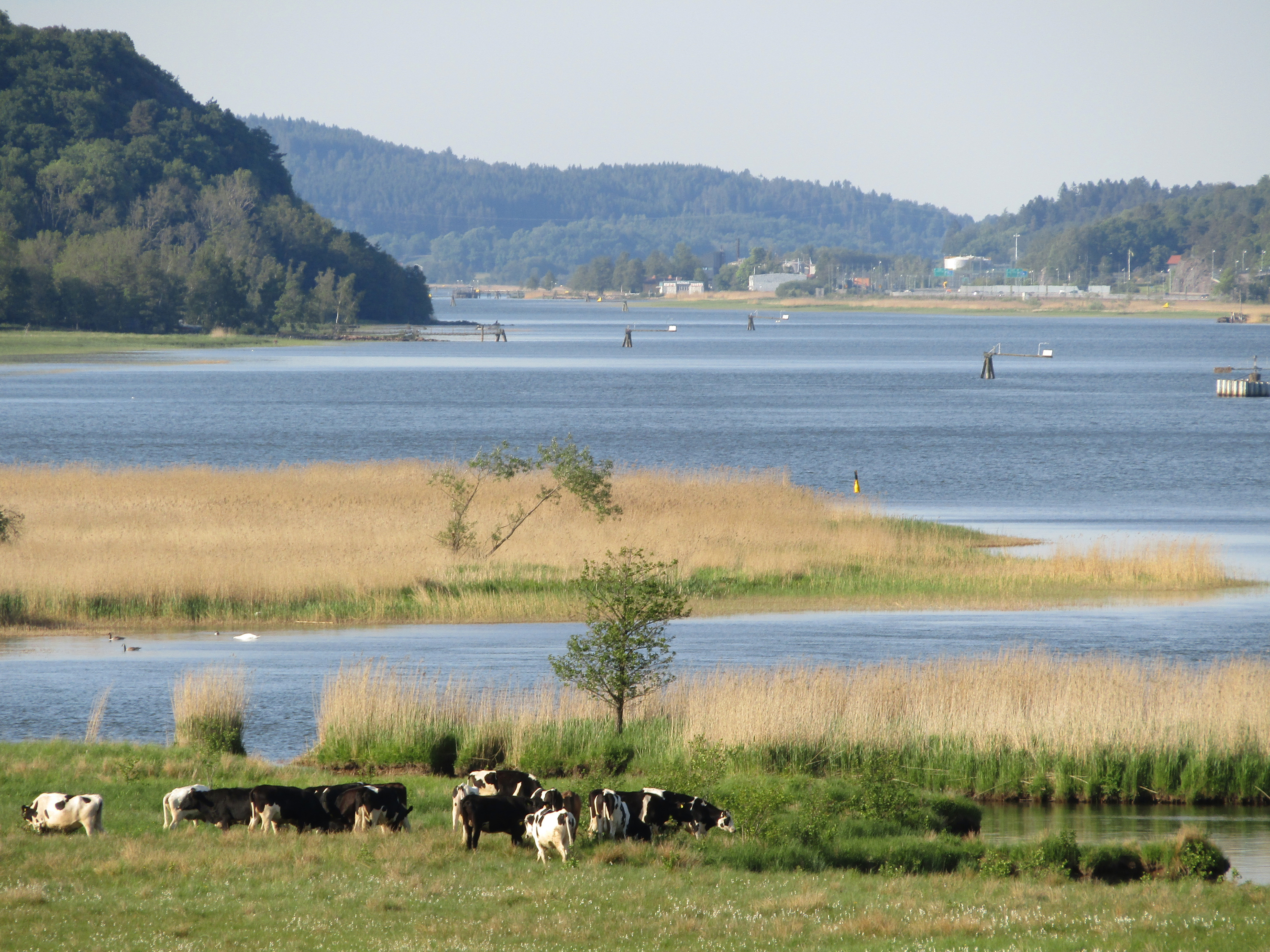 Naturreservatet Göta och Nordre älvs dalgångar i Göteborg, öster om Eriksdal. Vy från Jordfallsbron.